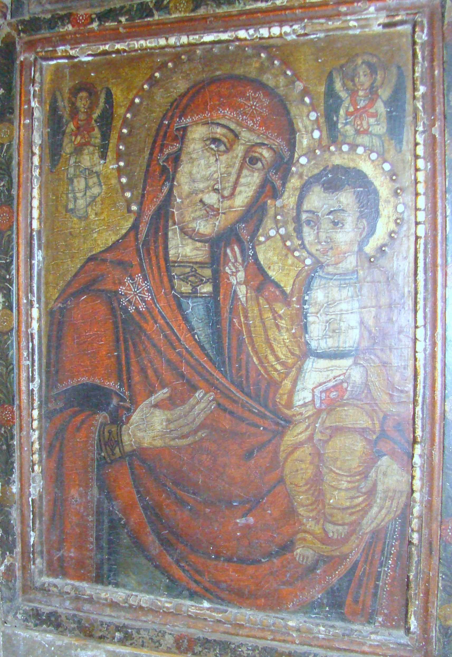 Biserica de lemn "Sfinții Arhangheli Mihail şi Gavriil" din Chieșd, județul Sălaj